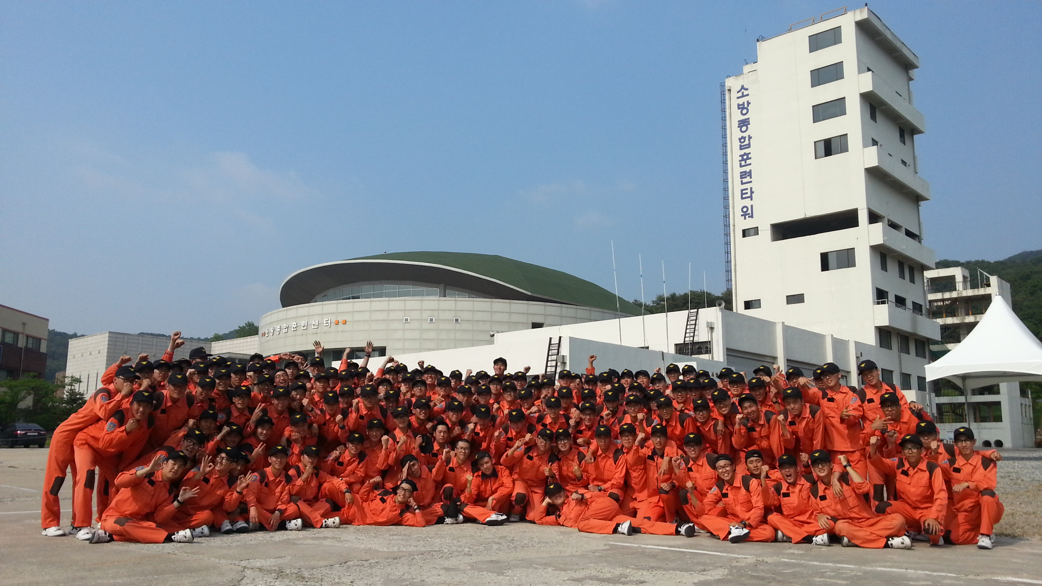 중앙소방학교 제39기 의무소방원 소방실무과정